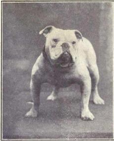 Bulldog from 1915